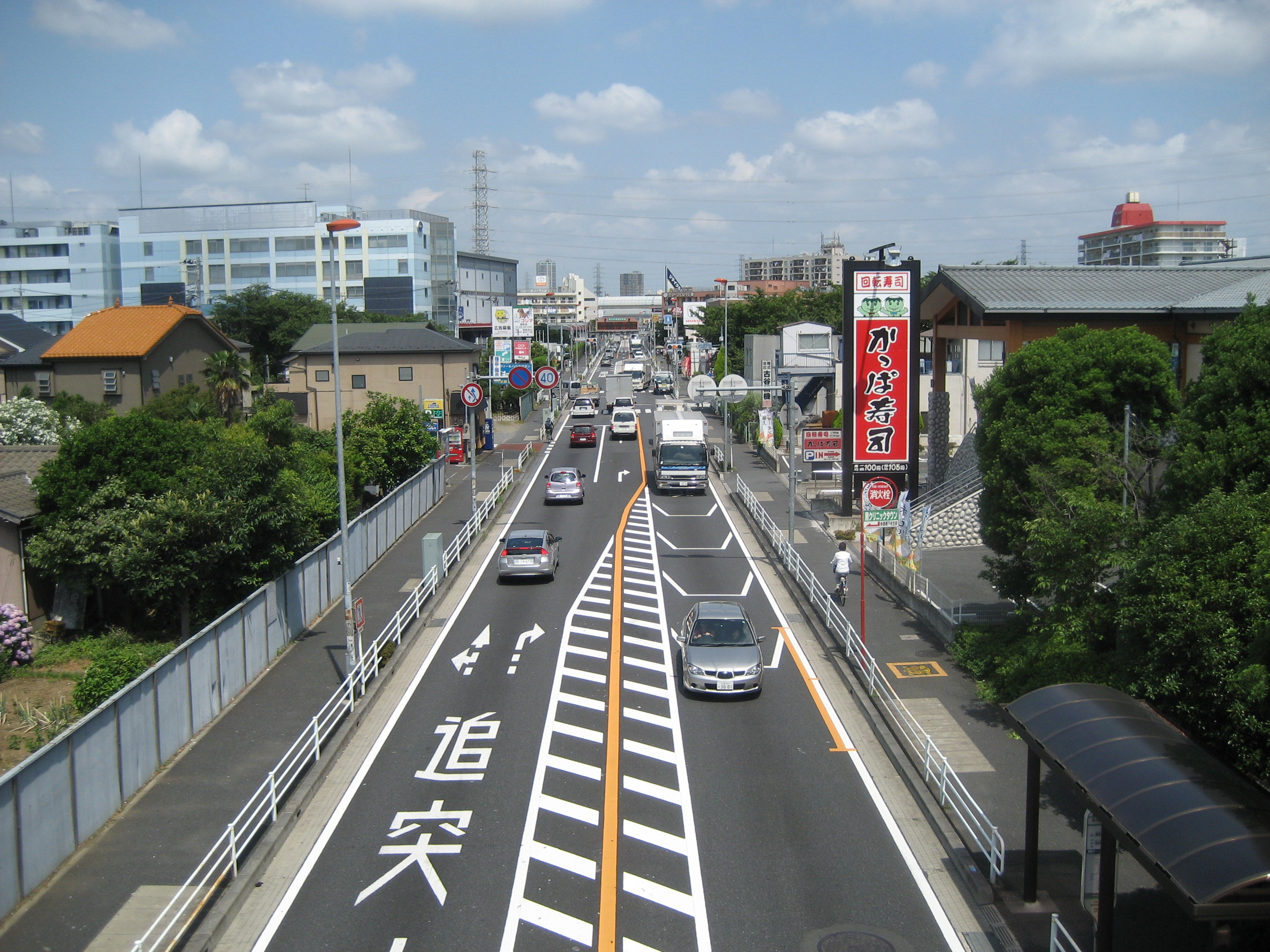 国道17号線蕨市内２